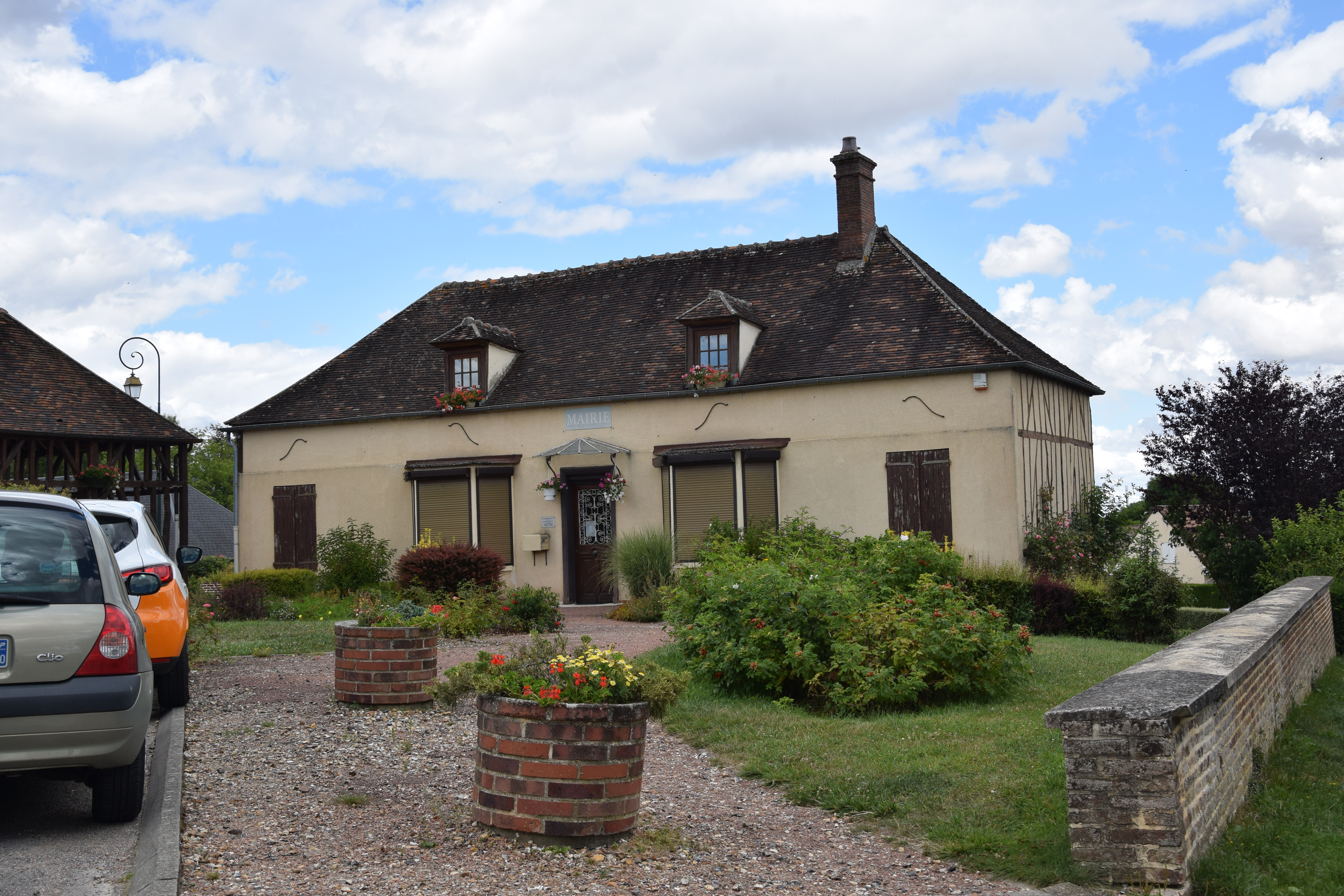 Savignies